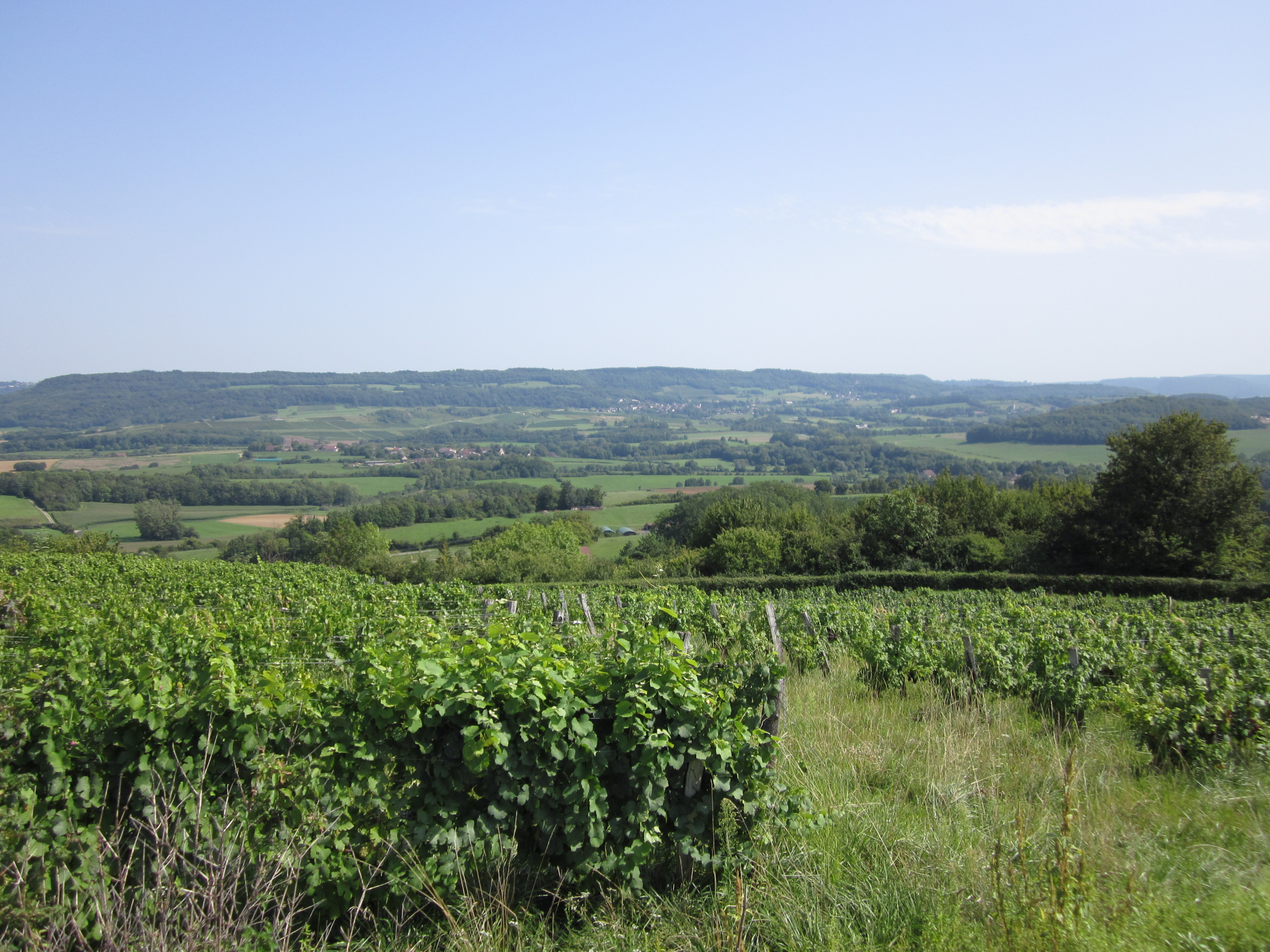 Toulouse-le-Château - vignoble (côtes du Jura). A l'arrière-plan, le village de Domblans